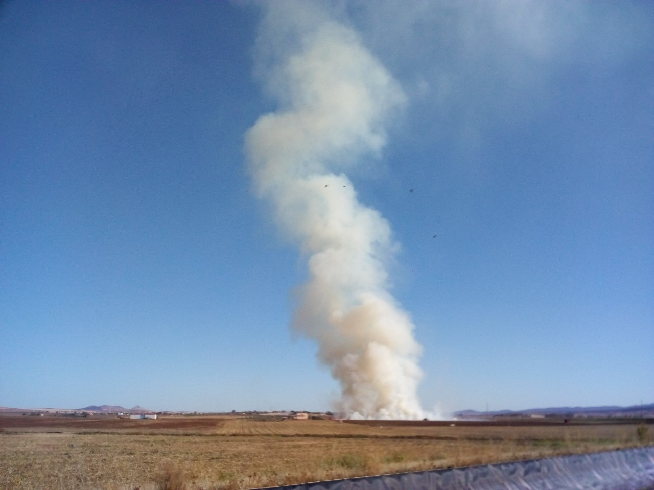 Fumo el stoplo